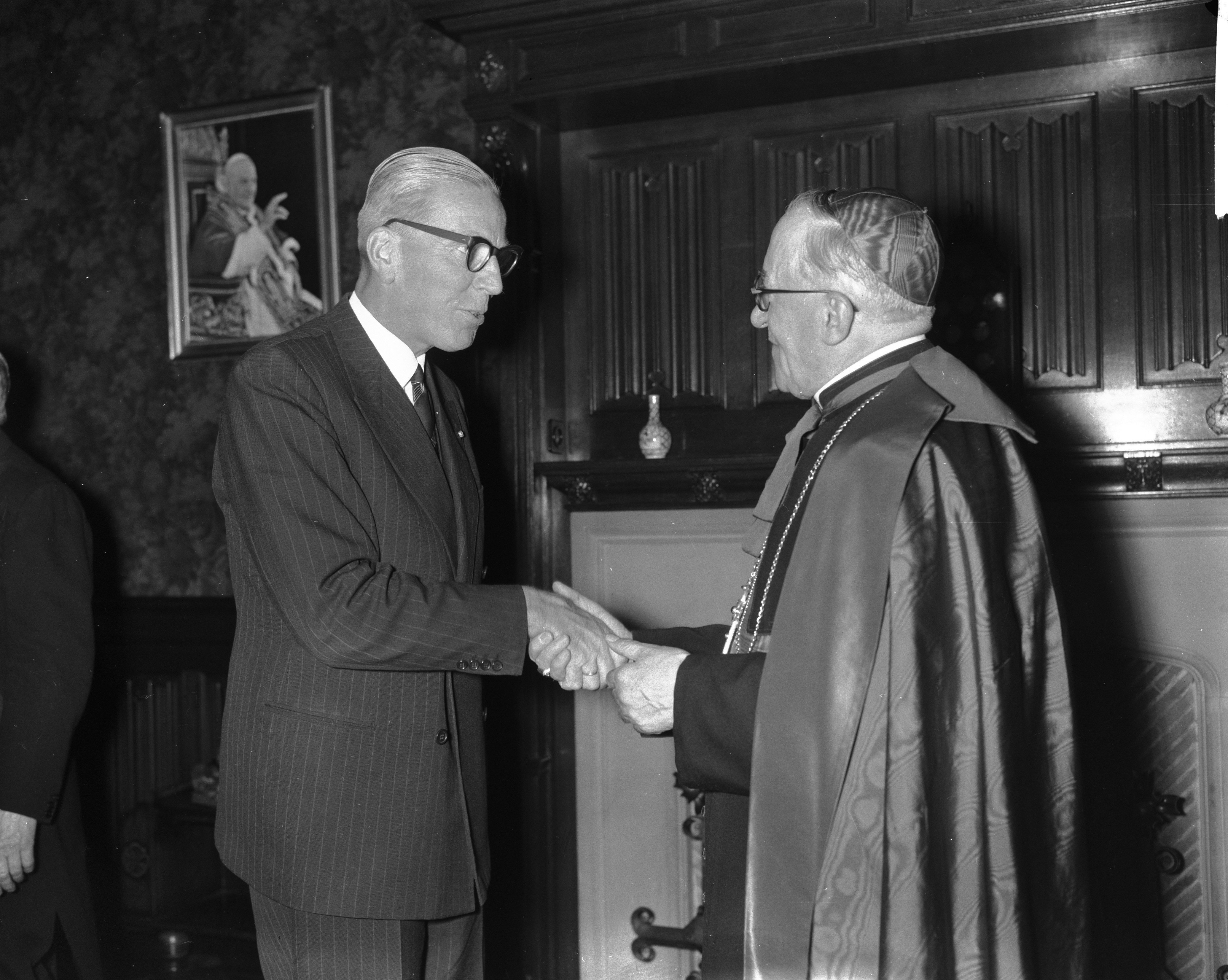 Collectie / Archief : Fotocollectie Anefo Reportage / Serie : [ onbekend ] Beschrijving : Verjaardagsfeest van kroning van de Paus. Minister van Justitie A.C.W. Beerman feliciteert de Pauselijke nuntius in Nederland, monseigneur Beltrami Datum : 6 november 1961 Trefwoorden : feesten, geestelijken, kardinalen, ministers, verjaardagen Persoonsnaam : Beerman A C W, Beltrami Fotograaf : Bilsen, Joop van / Anefo Auteursrechthebbende : Nationaal Archief Materiaalsoort : Negatief (zwart/wit) Nummer archiefinventaris : bekijk toegang 2.24.01.04 Bestanddeelnummer : 913-1479